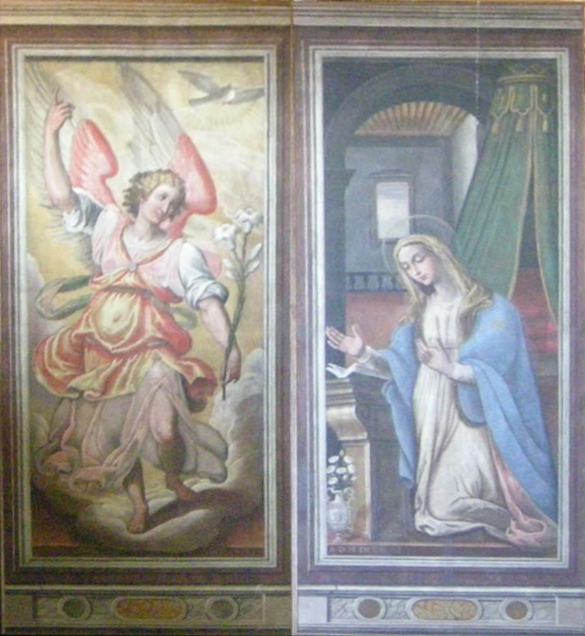 Le portelle dell'organo con l'Annunciazione (lato interno)